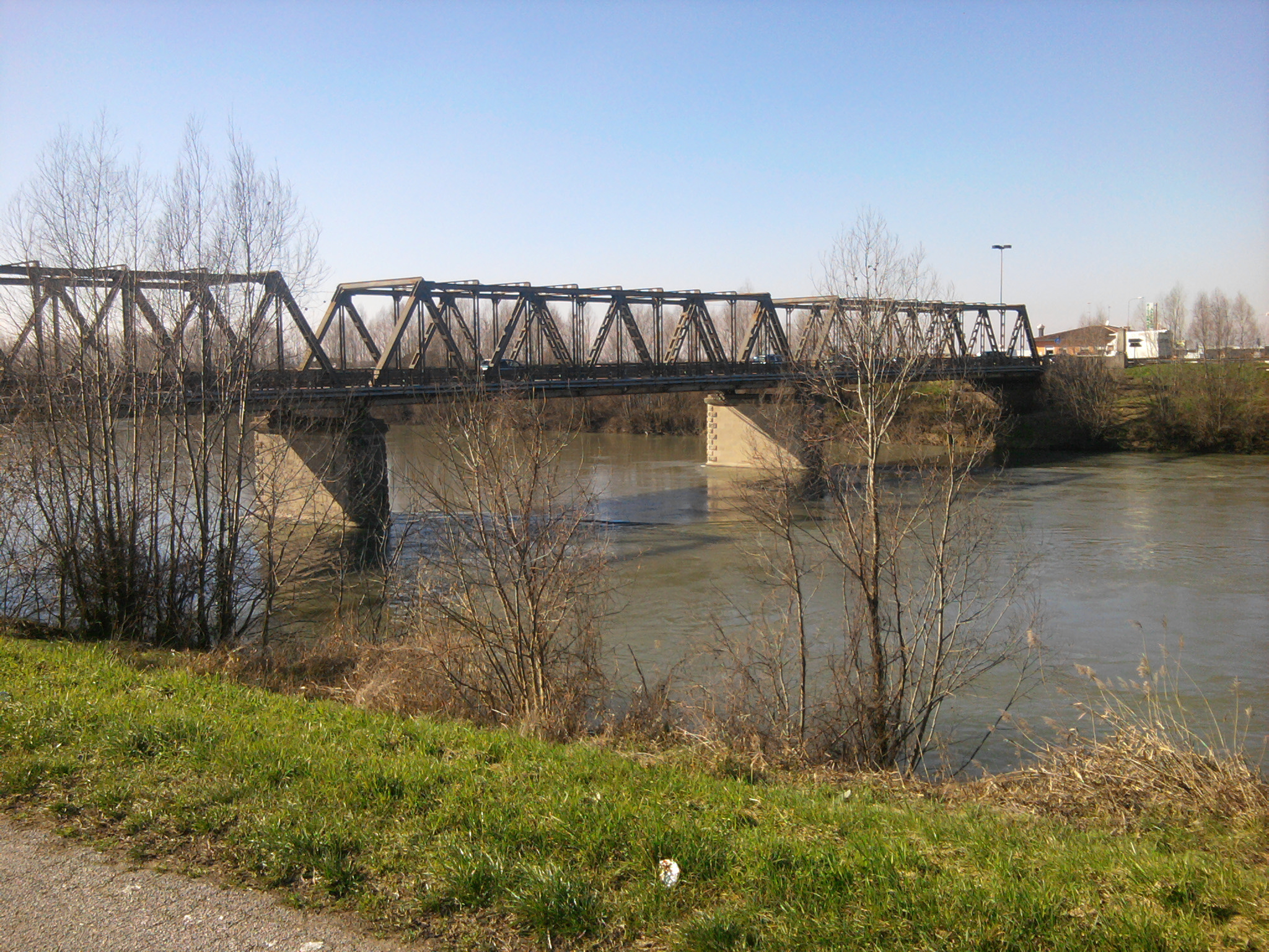 Boara Polesine, frazione di Rovigo: il ponte stradale che collega le due sponde dell'Adige tra l'abitato e il comune di Boara Pisani.